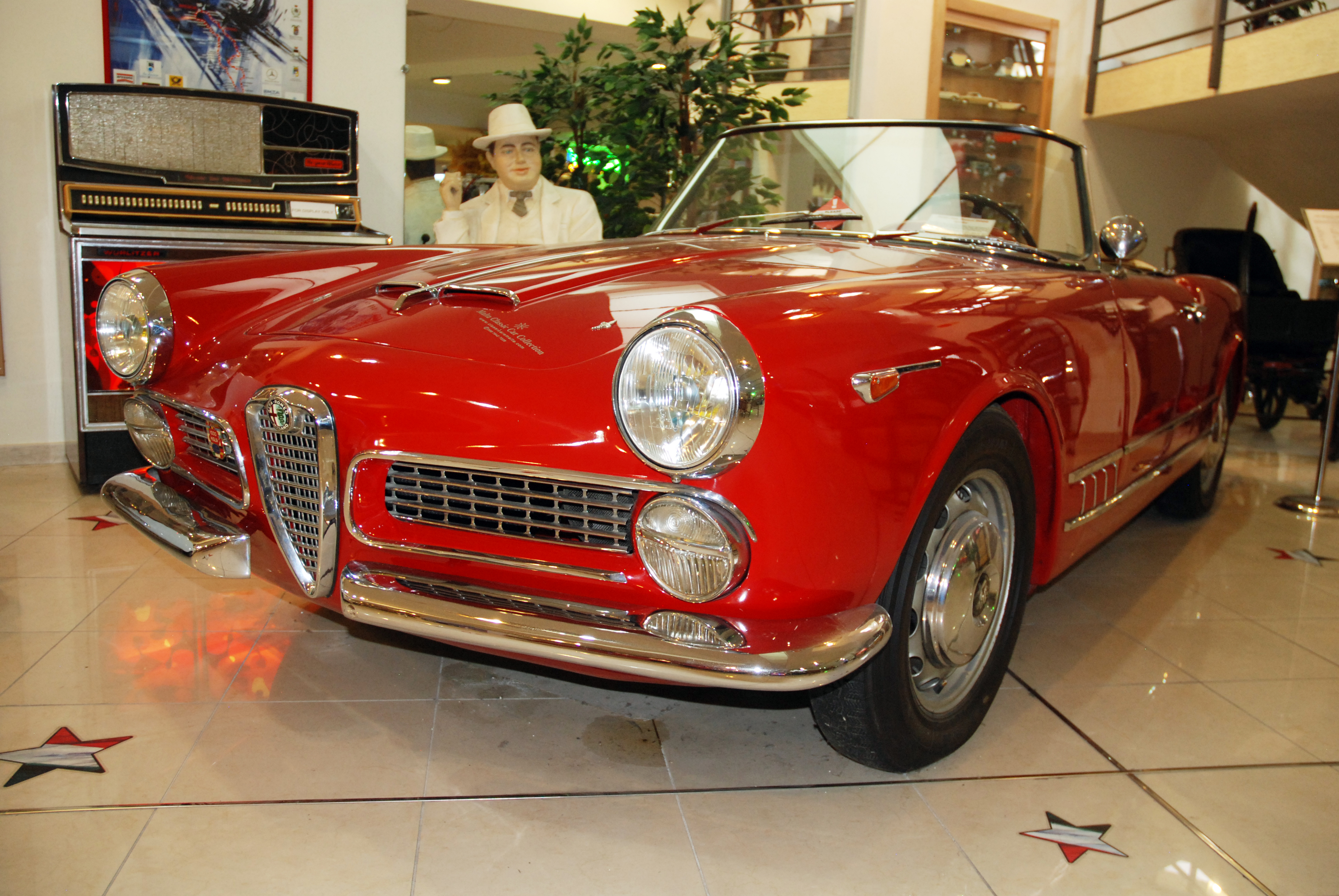 Malta Classic Car Museum,Sep 2013